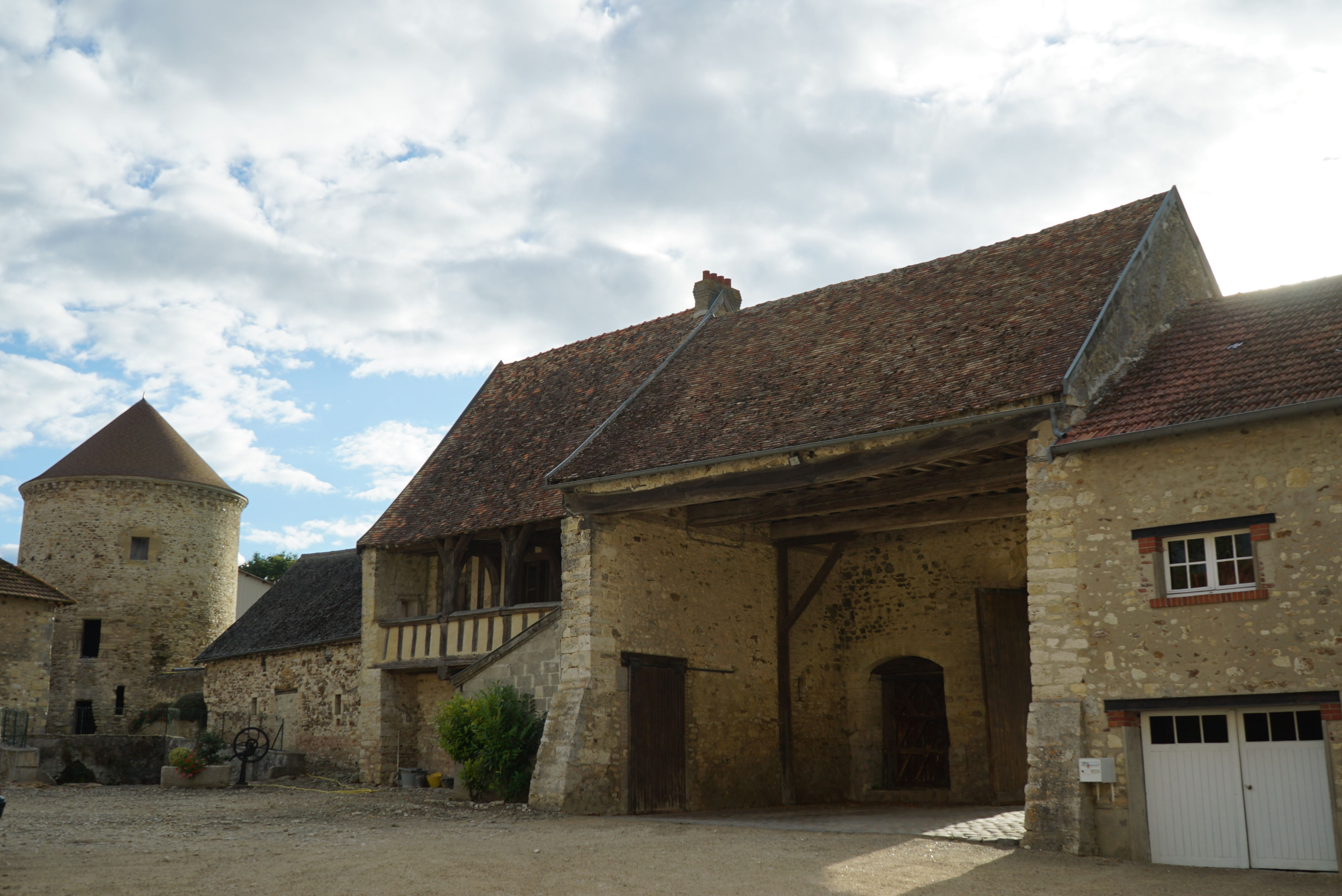 vue de Lagery